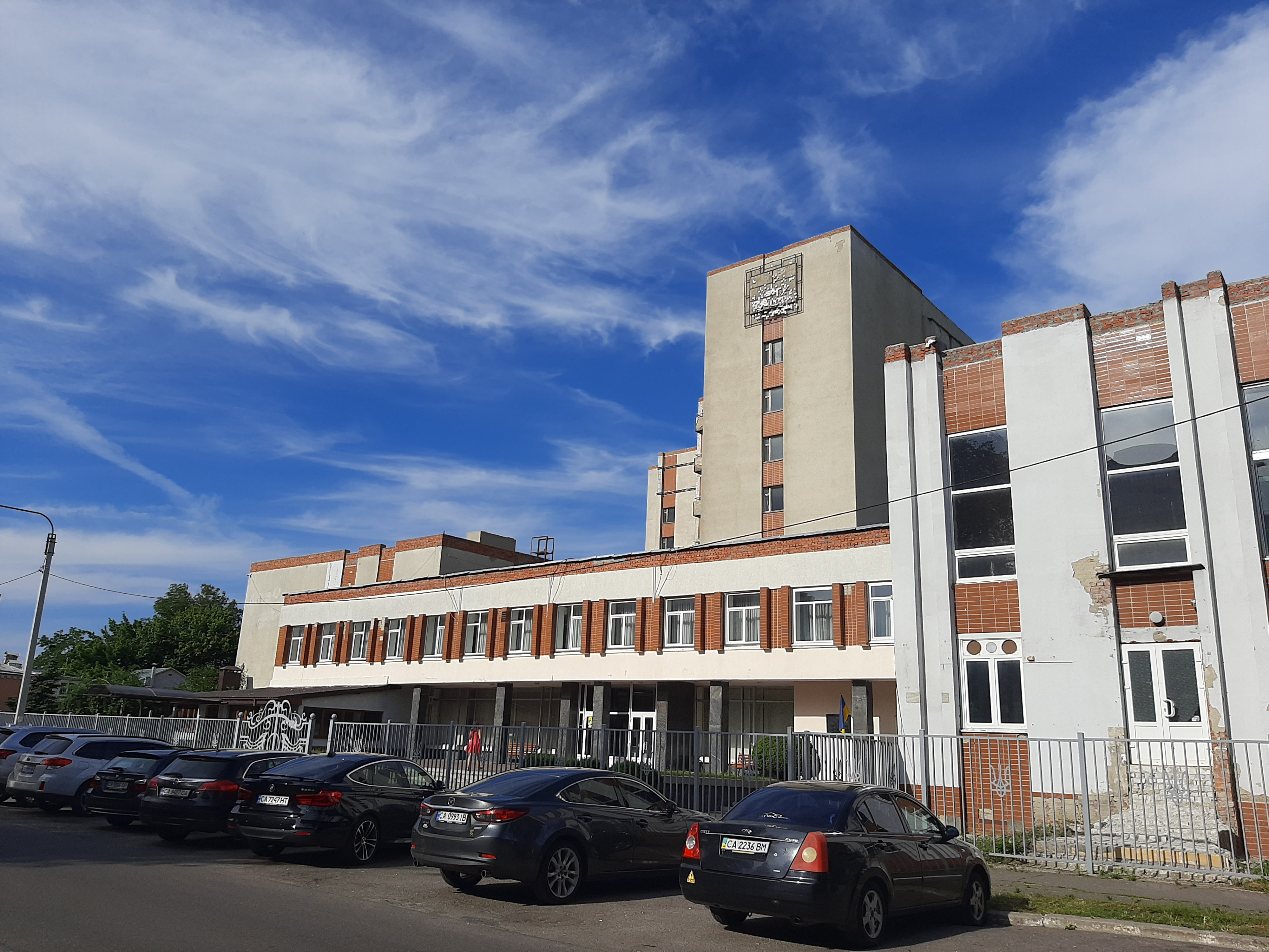 Черкаський апеляційний суд